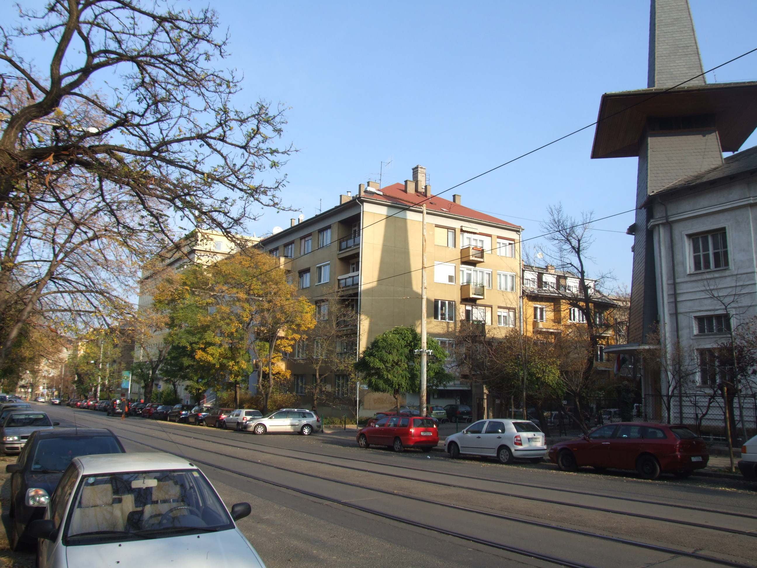 Kodolányi János lakóháza a Böszörményi út és Beethoven utca sarkán